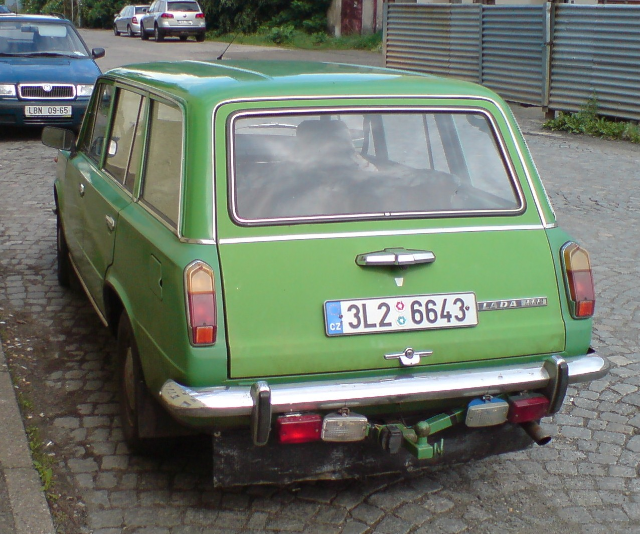 LADA 1200 Combi